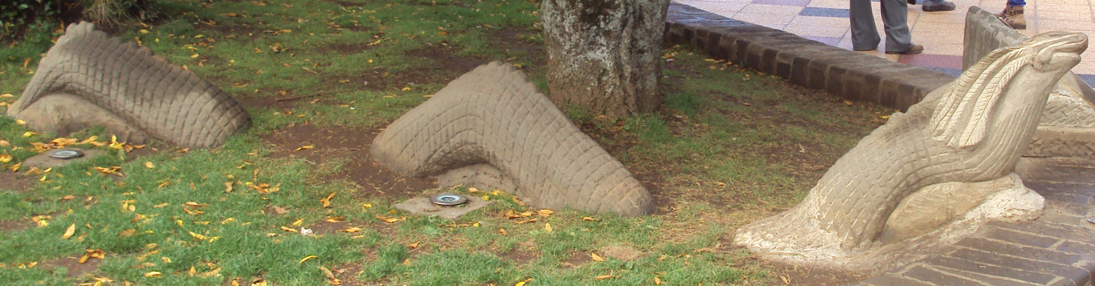 Estatua de Ten Ten Vilu en la Plaza de Ancud